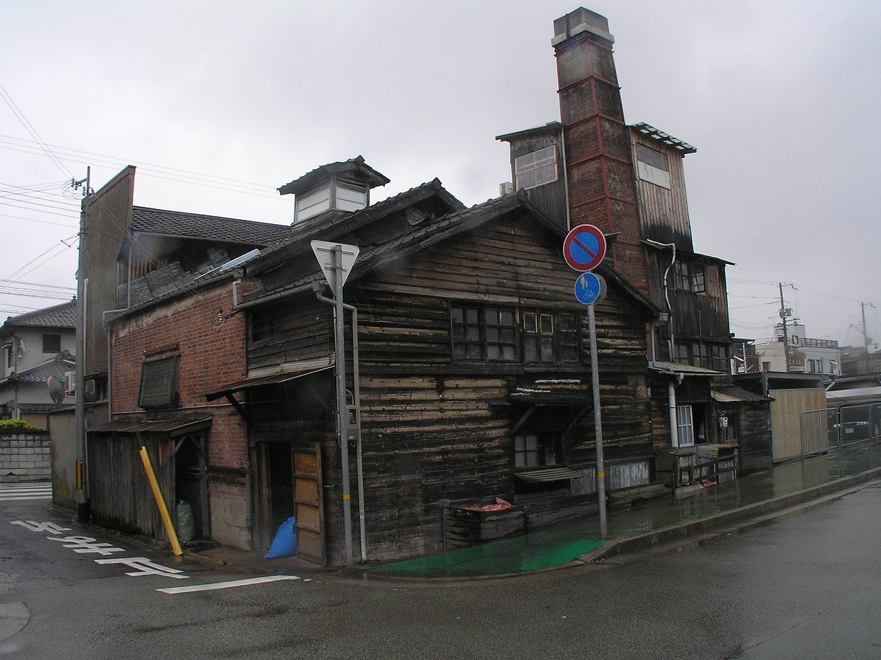 梅ヶ枝湯裏側全景